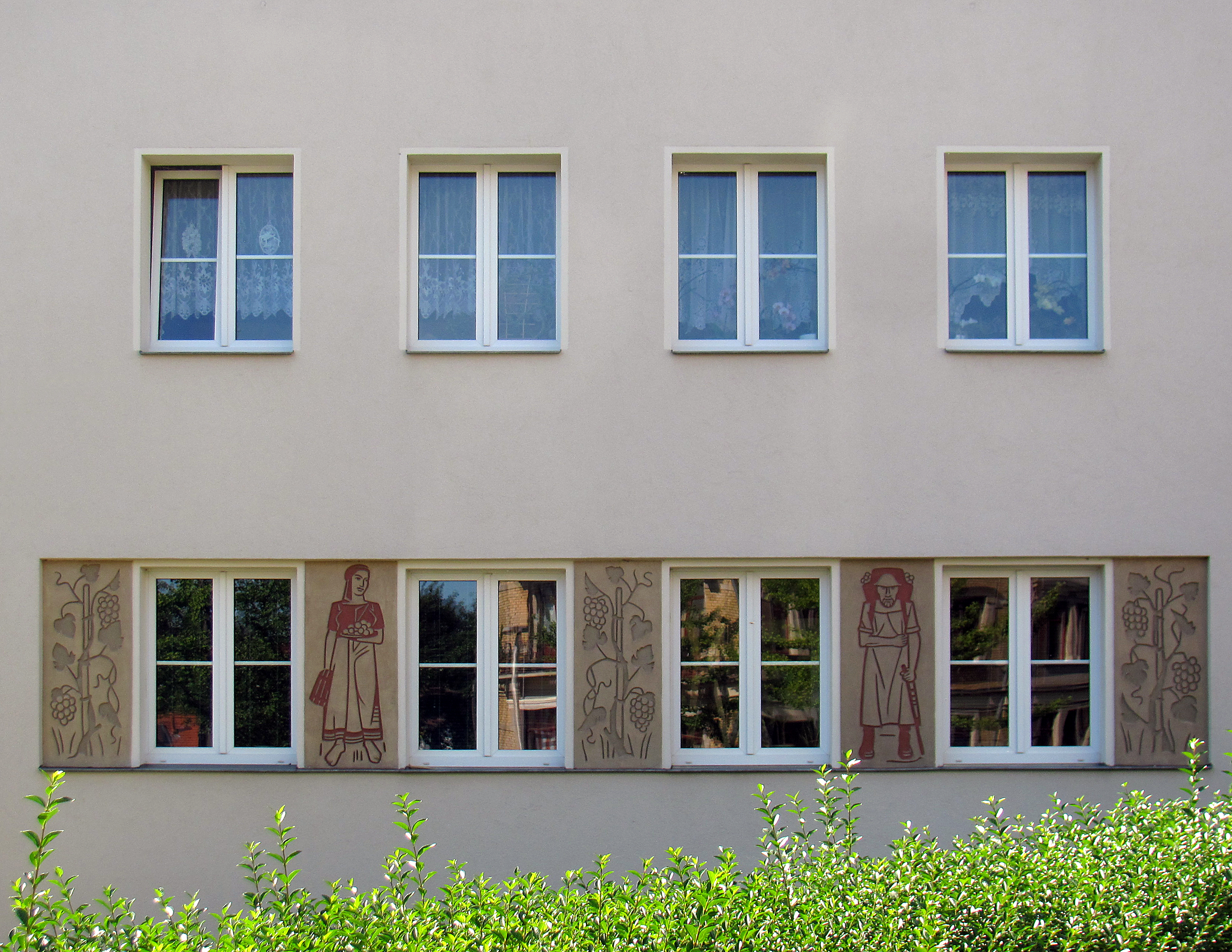 Radebeul (Gemarkung), Doppelwohnhaus Wichernstraße 21/21a (Radebeul), Sgraffiti von Hermann Glöckner